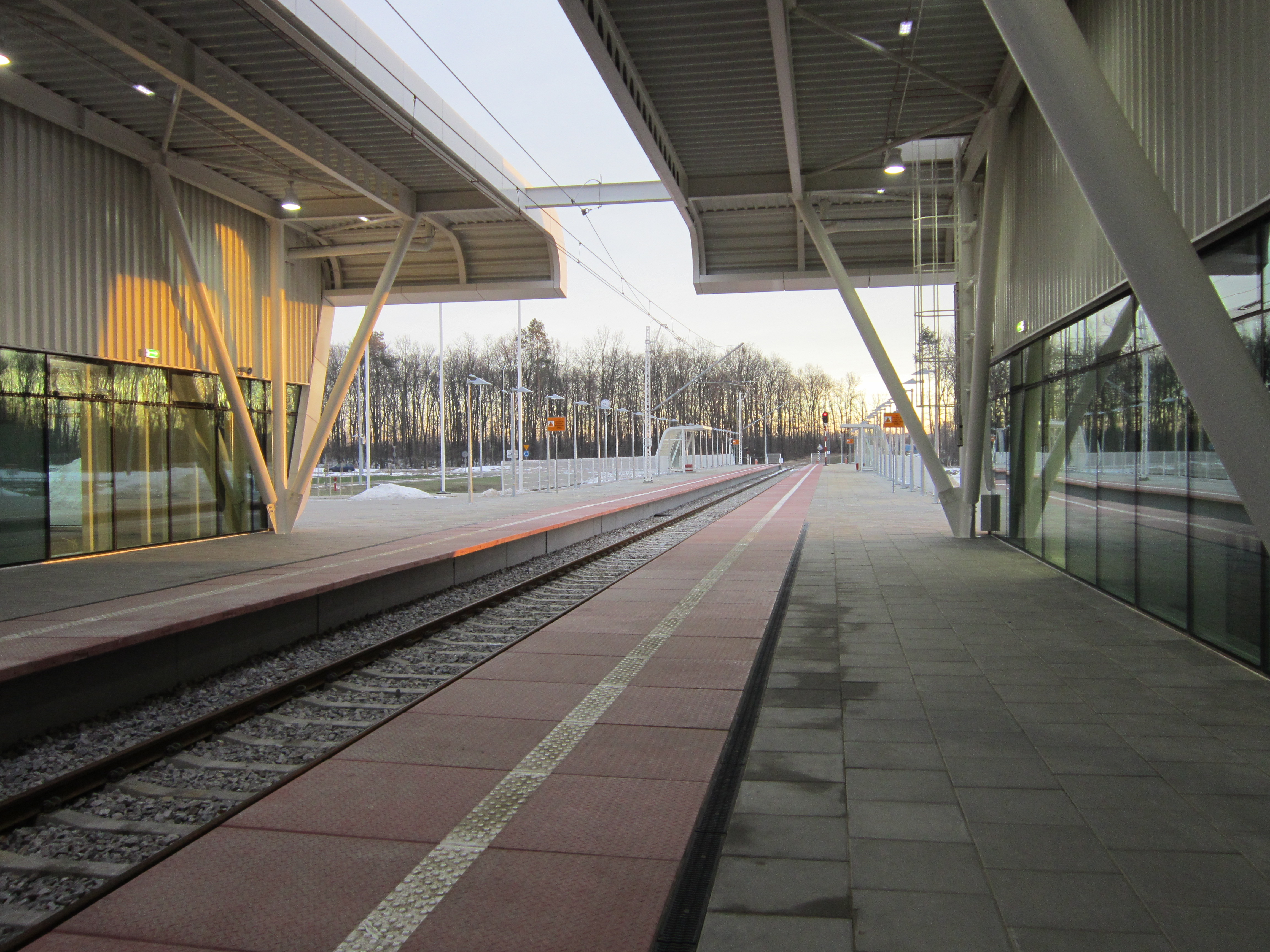 29 grudnia 2012, niedługo po zelektryfikowaniu stacji.